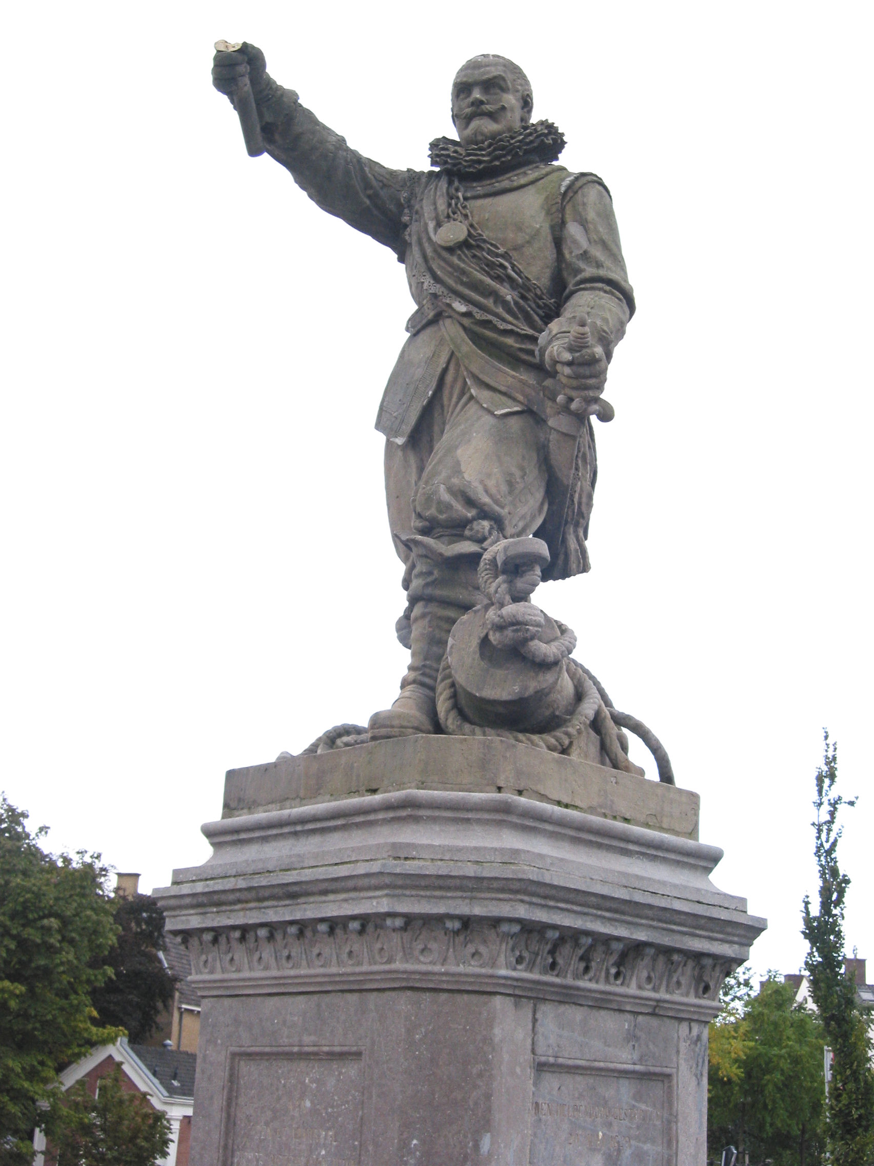 Piet Hein in Delfshaven, Zuid-Holland, the Netherlands